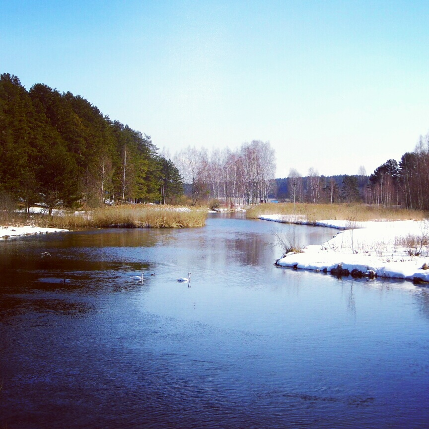 суя